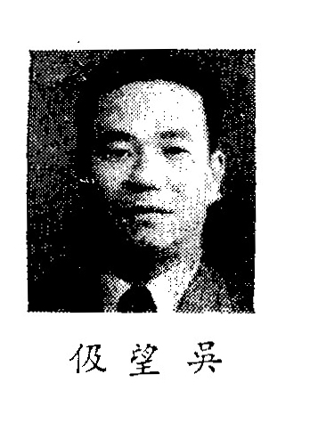 中文（中国大陆）: 制憲國民大會代表